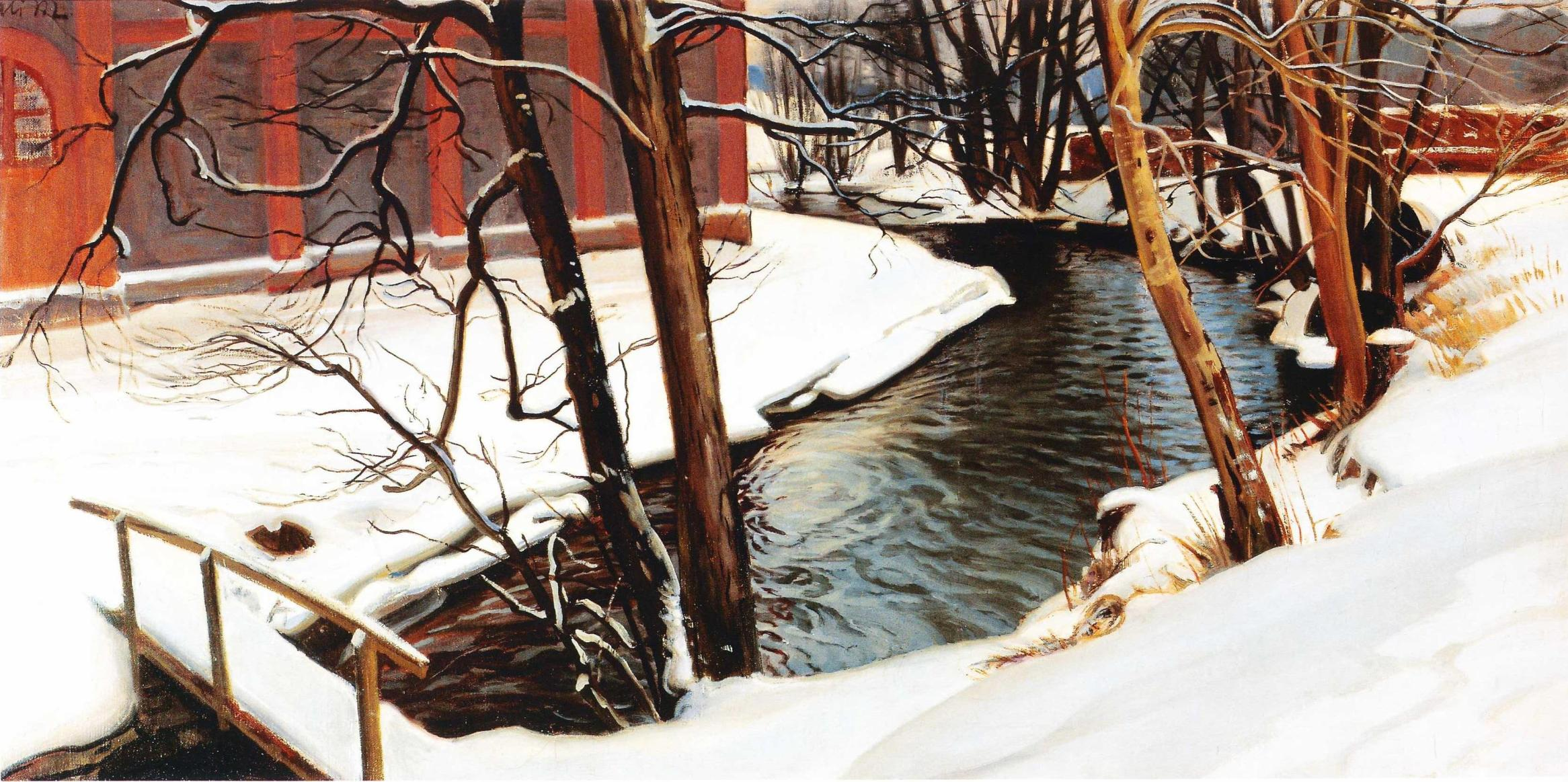 Ali Munsterhjelmin maalaus Fiskarsista. Kuuluu Taidesäätiö Meritan kokoelmiin.